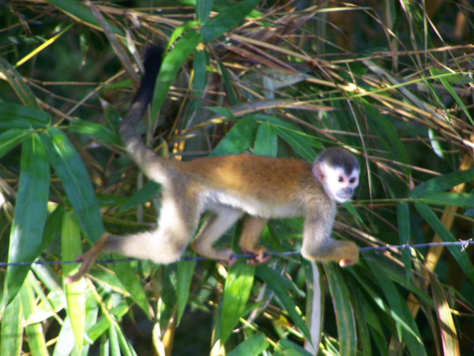 Central American Squirrel Monkey near Manuel Antonio in Costa Rica